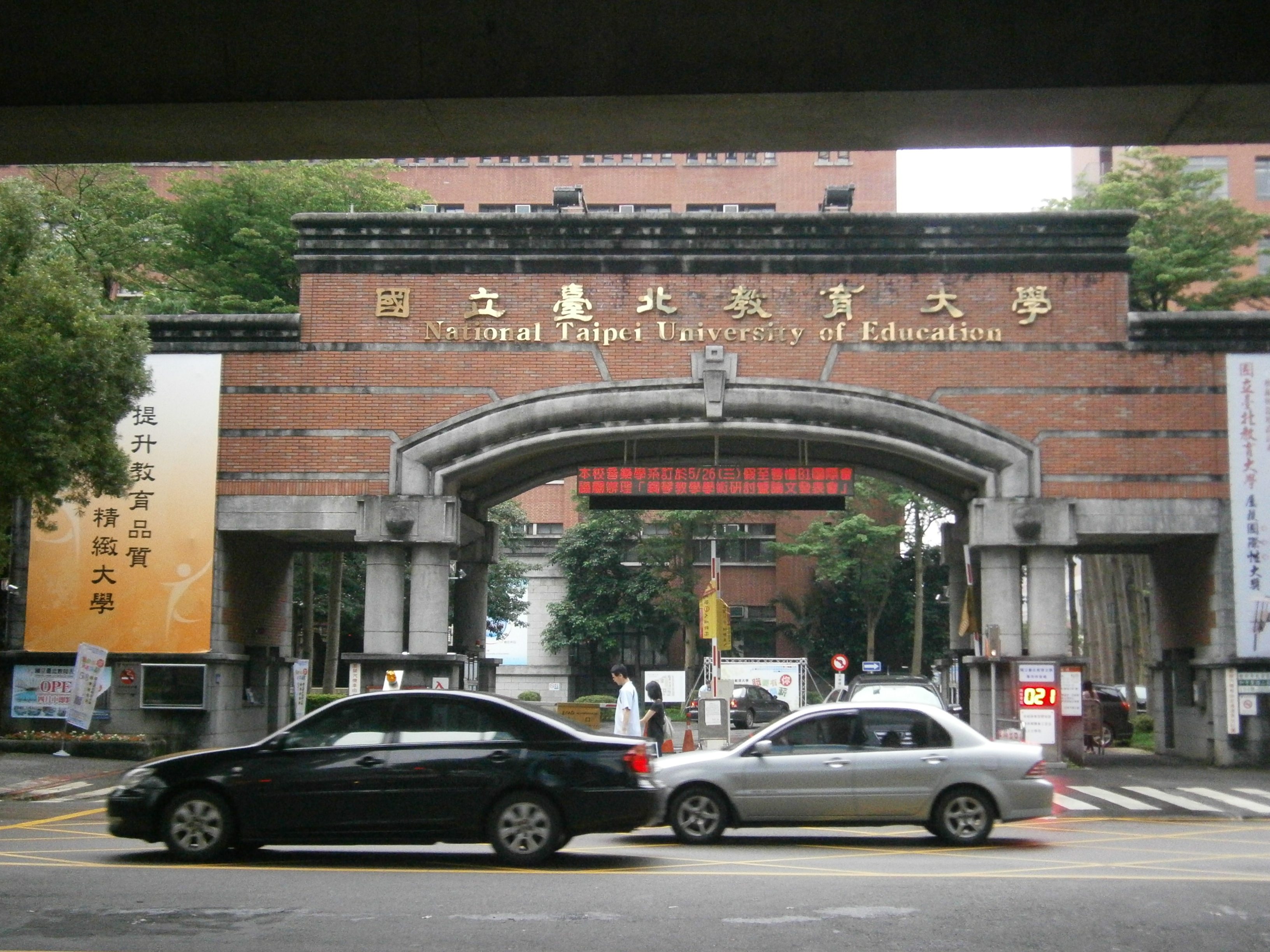 中文（台灣）: 國立臺北教育大學大門。